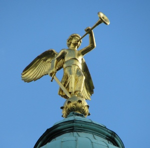 Erzengel Michael auf der Christuskirche in Mannheim.